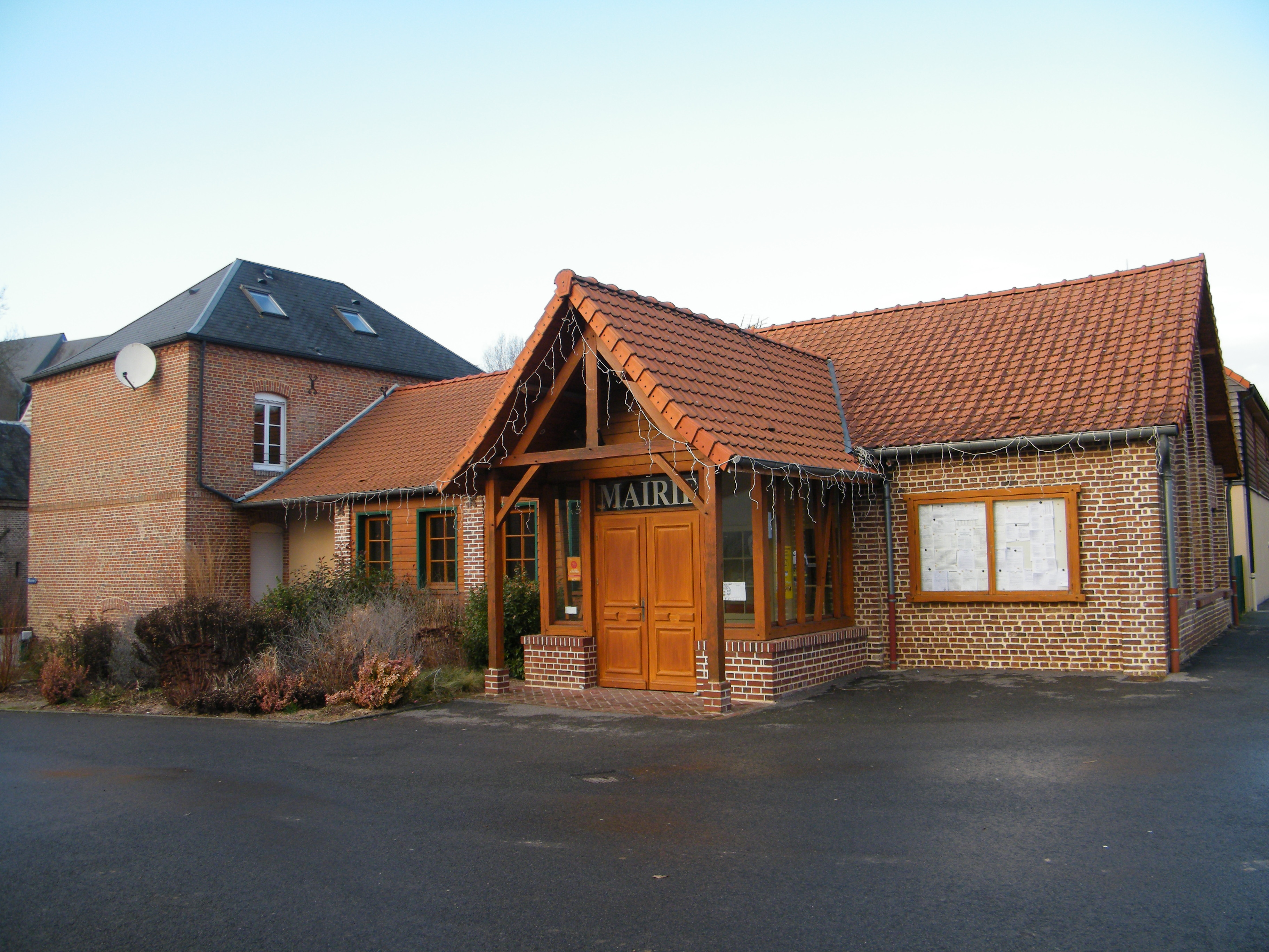 Mons-Boubert, Somme, Fr, mairie.